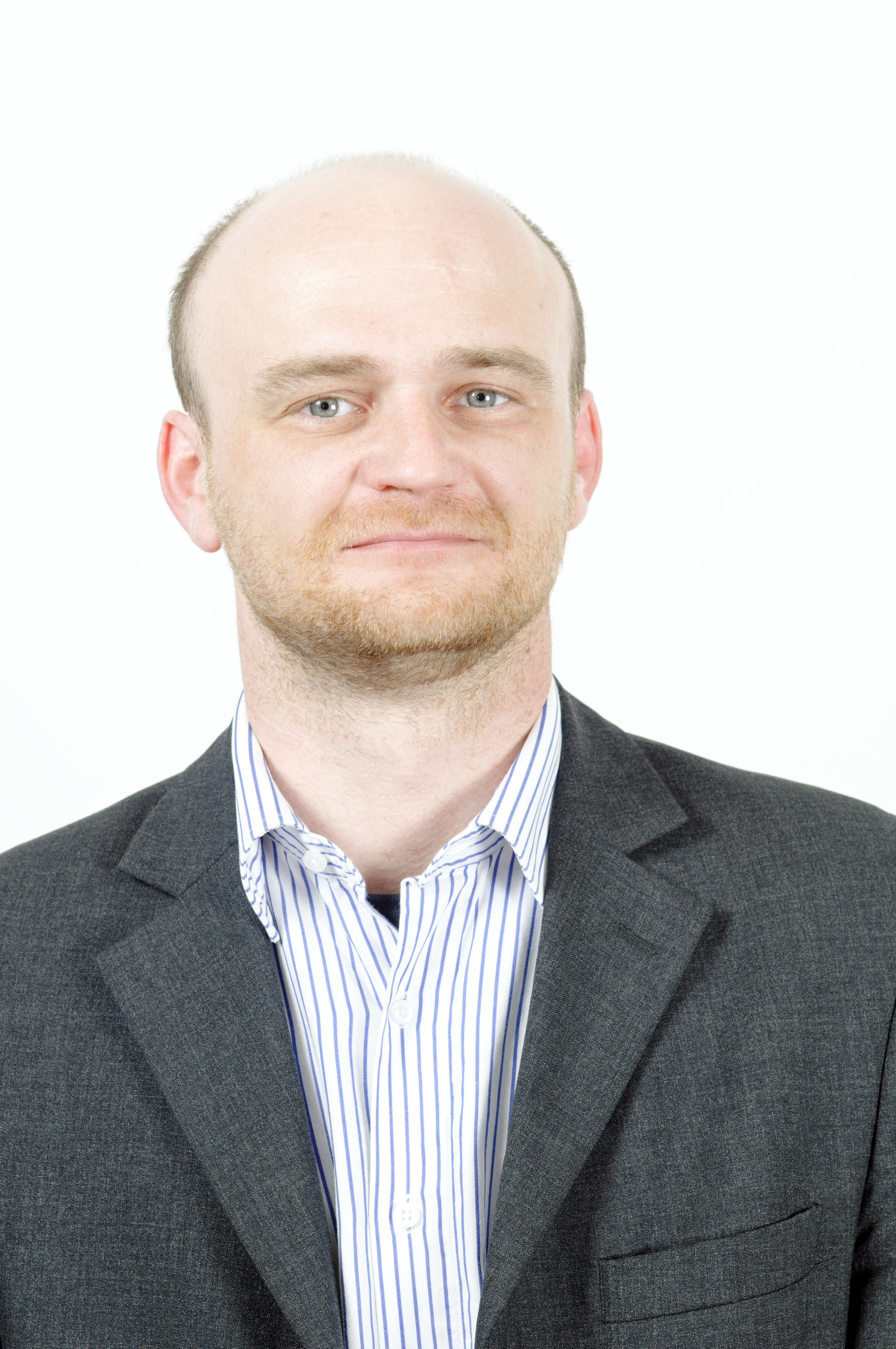 Mike Huster - Mitglied des Thüringer Landtages